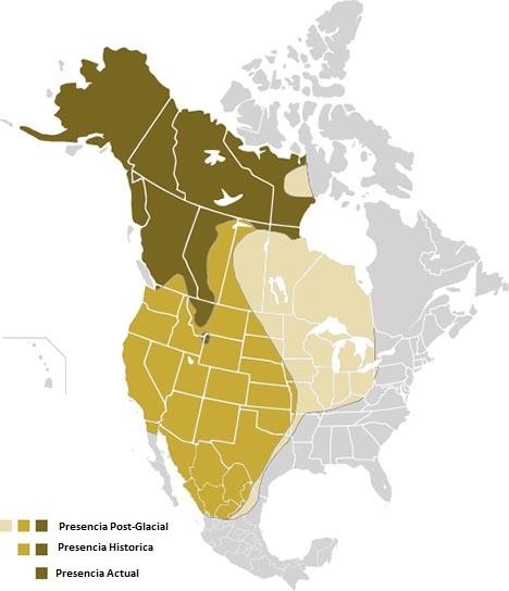 Disminucion del rango territorial del Oso grizzly (Ursus Arctos Horribilis)